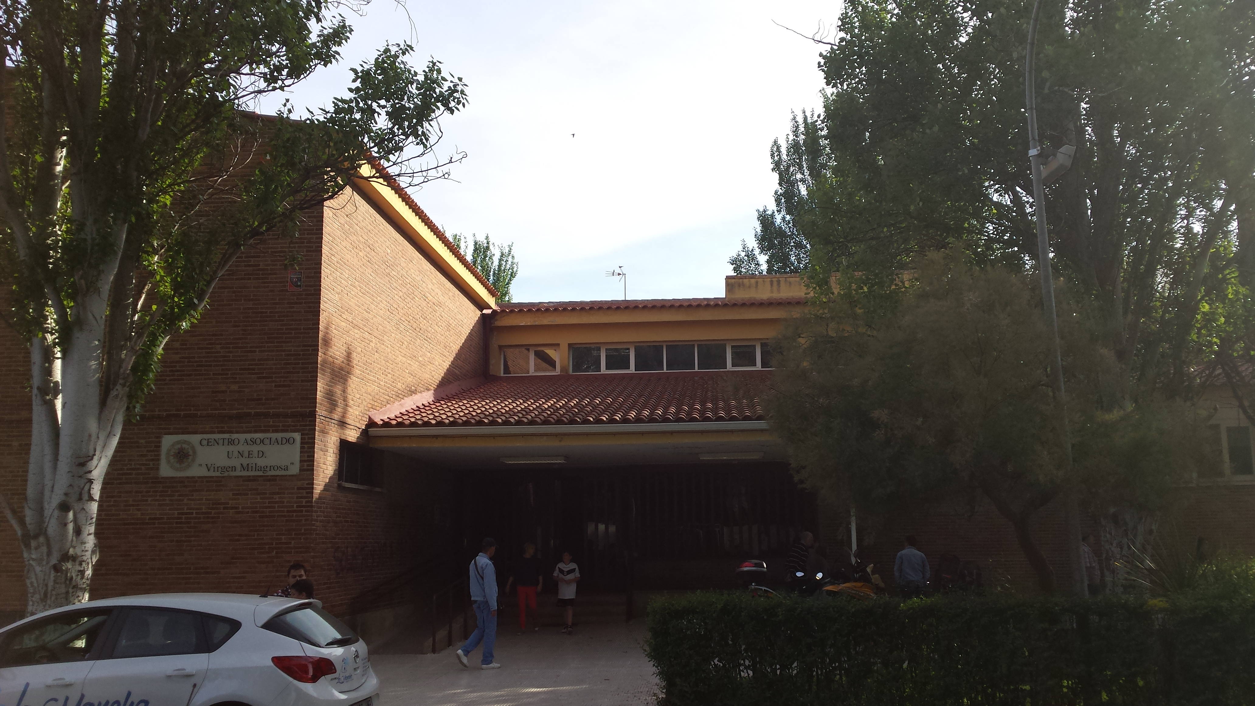 Centro Asociado UNED Albacete Virgen de la Milagrosa